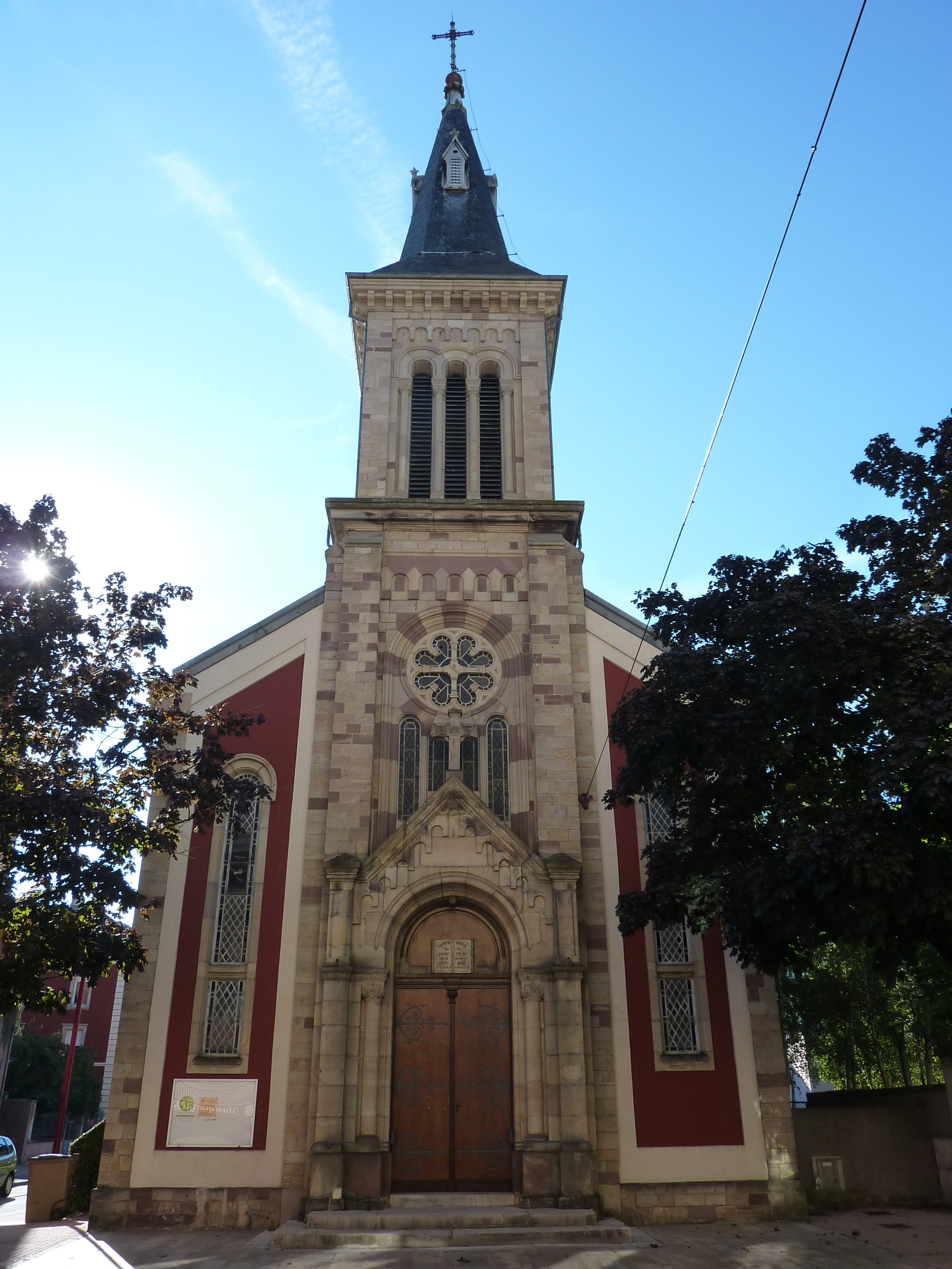 Le temple Saint-Jean de Belfort